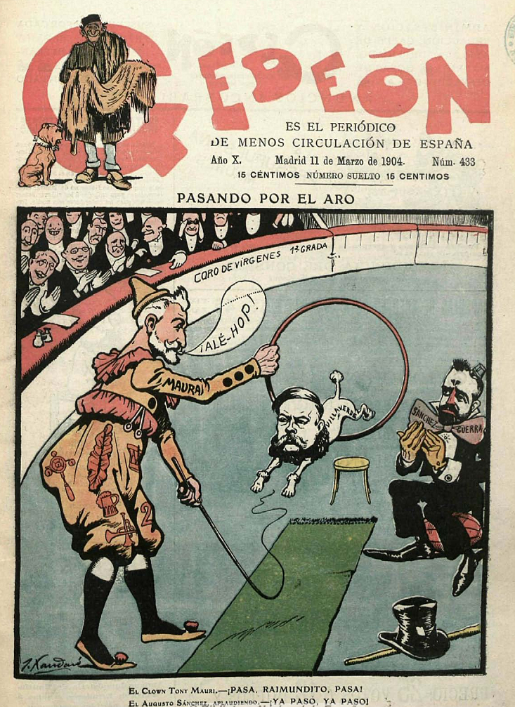 Pasando por el aro, en la revista satírica española Gedeón.